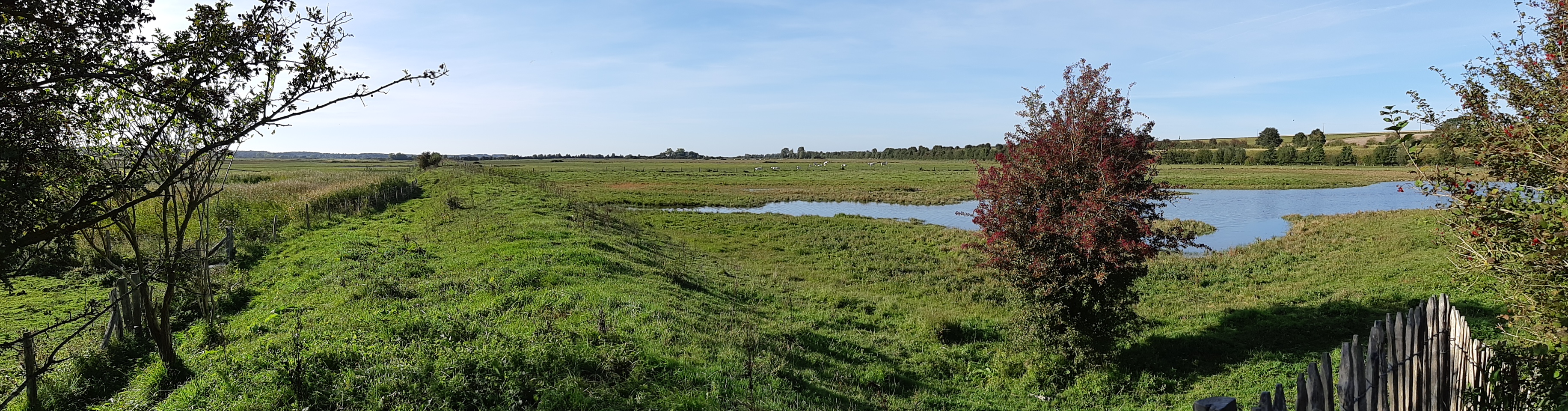 Vue de l'ancienne digue ou renclôture